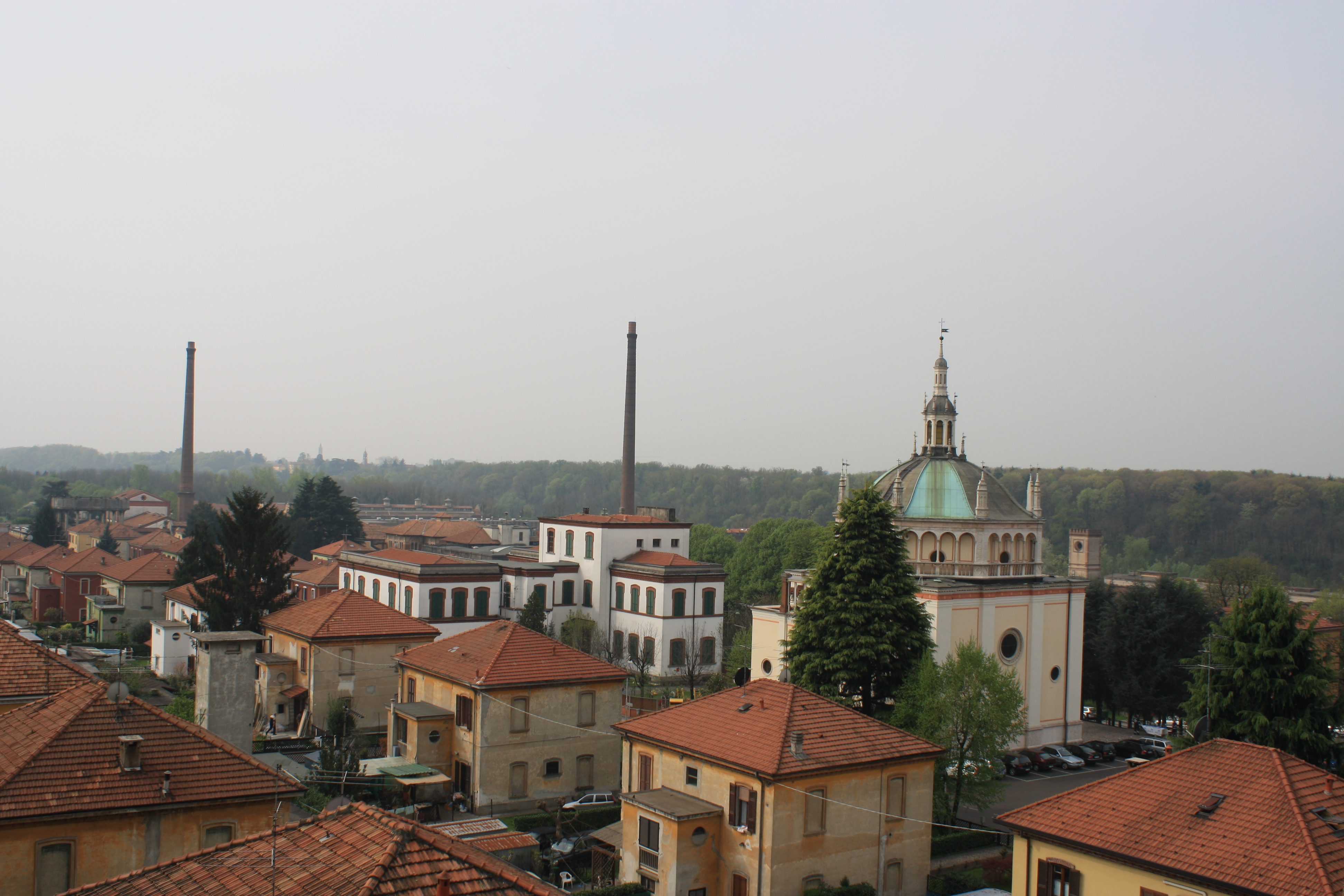 Vista del villaggio operaio di Crespi d'Adda (frazione di Capriate San Gervasio, in provincia di Bergamo): si vedono le due ciminiere della fabbrica, oggi non più in funzione, le case degli operai, la scuola (l'edificio bianco) e la chiesa, del tutto simile al Santuario di Santa Maria di Piazza di Busto Arsizio.